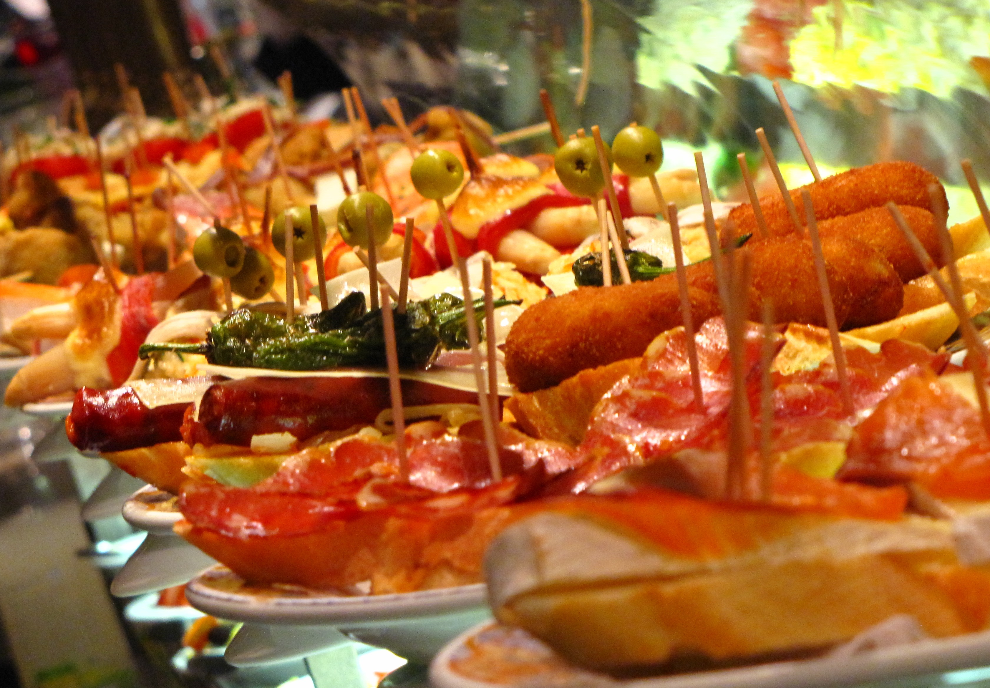 Tapas en un establecimiento de Barcelona (España)